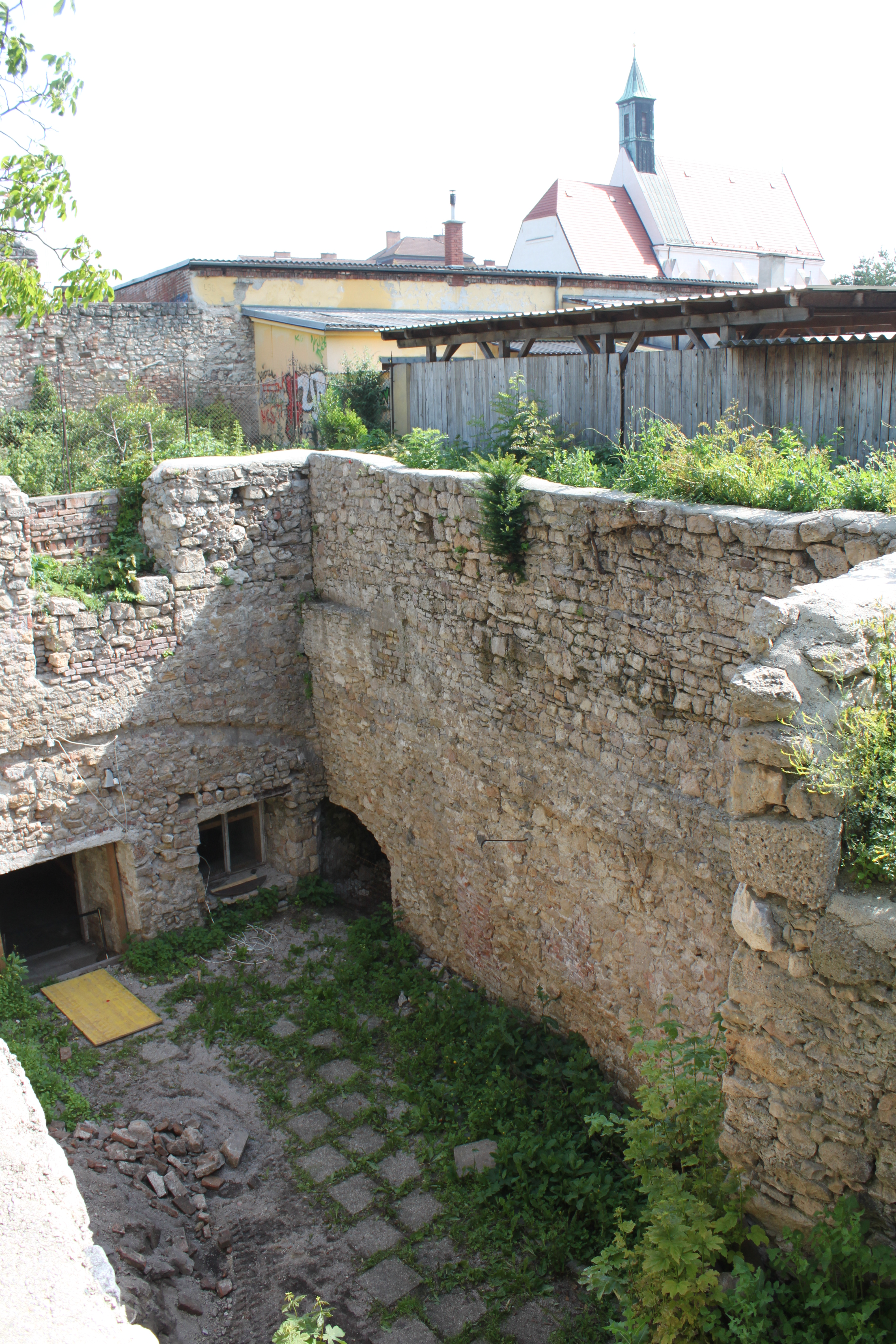 Stadtbefestigung (Gesamtanlage), Kasematten, südseitiger ummauerter Hof, wohl ehedem in der Tiefe überwölbt